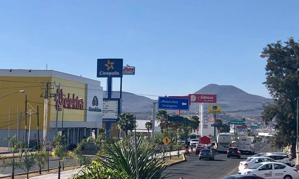 Centro Comercial Galerías Metropolitana Uriangato